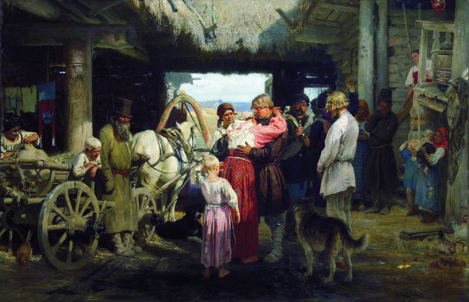 Картина И. Репина «Проводы новобранца»